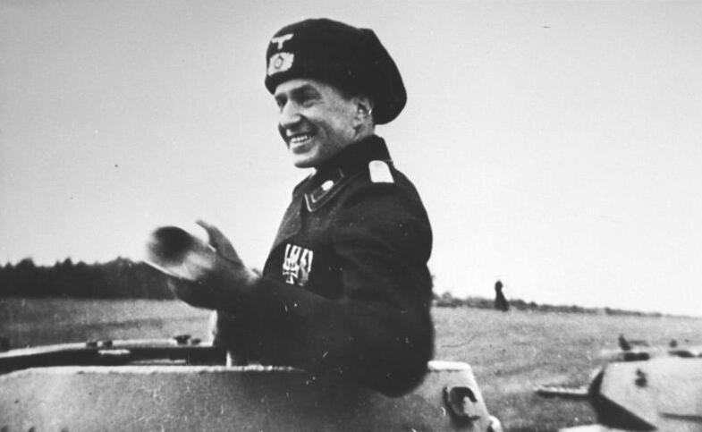 This description has been identified as biased or incorrect: Munzel war 1943 Oberst und Kommandeur des Panzer-Regiments 6Hptm. Oskar Munzel, Chef 5.Pz.Rgt.6